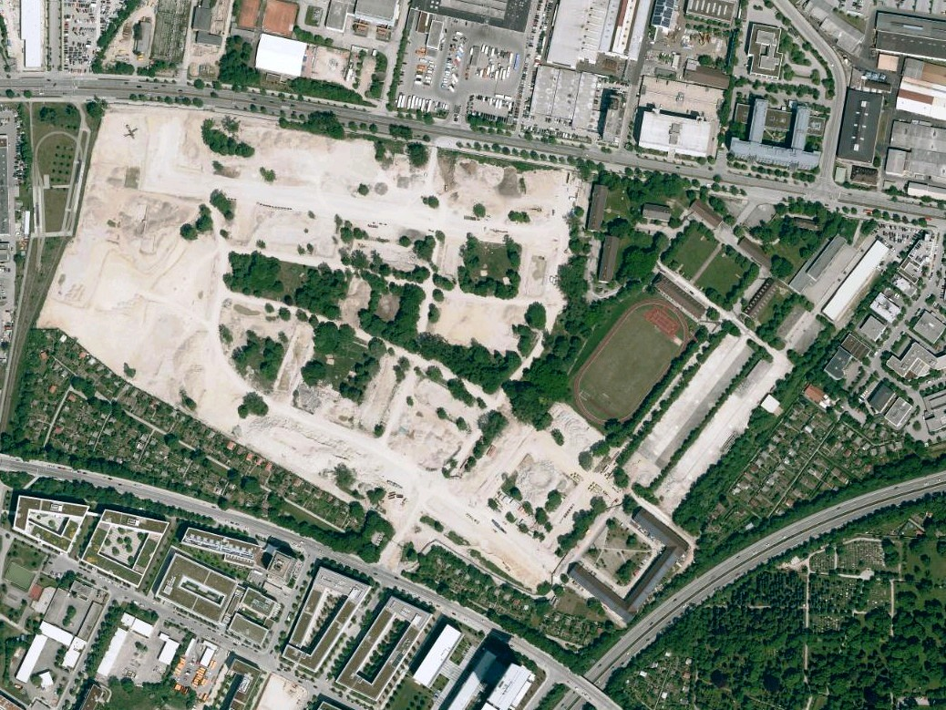 Luftaufnahme der Bayerischen Vermessungsverwaltung: Gelände der ehemaligen Funkkaserne in München, Bayern, vor der Neubebauung.